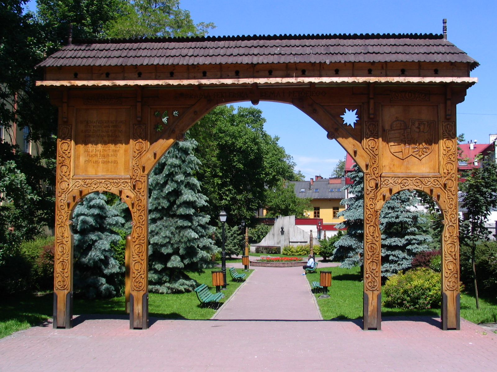 Poland, Tarnów, Szeklers' gate